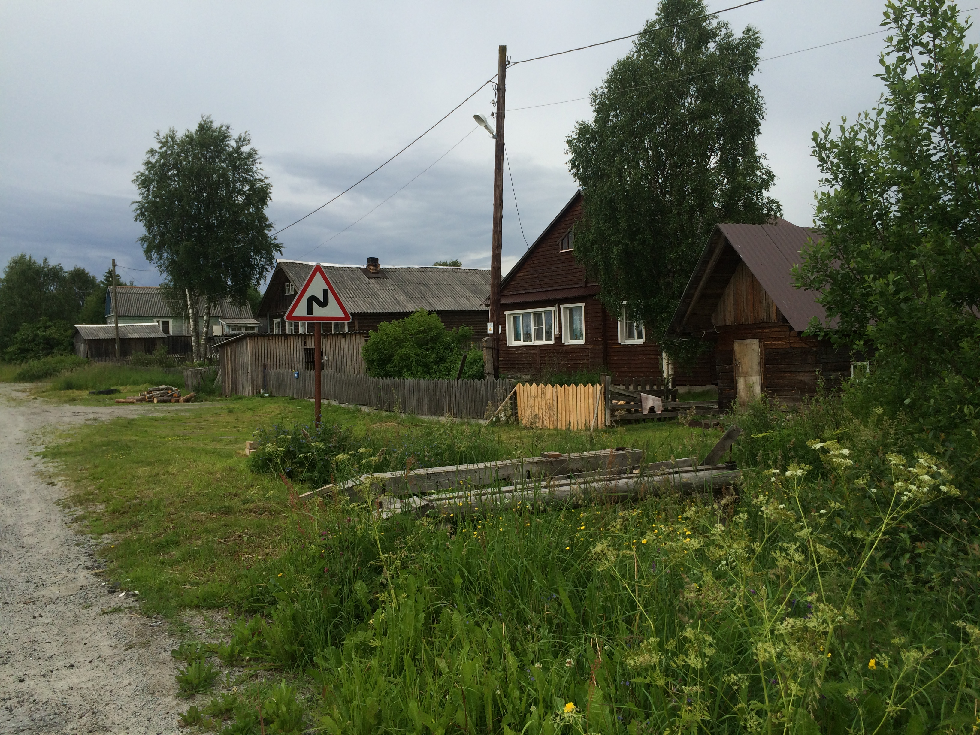 Чёбино